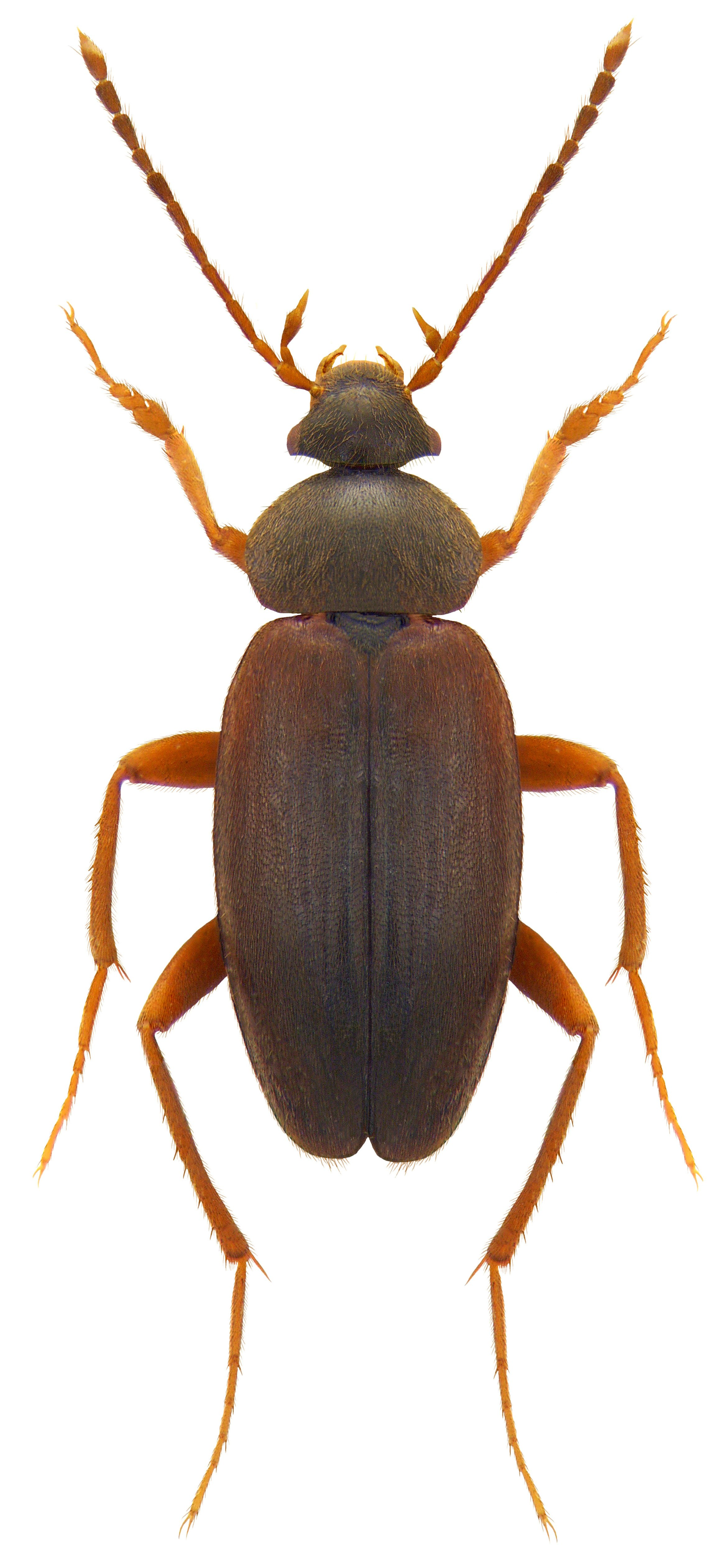 Familie: Cholevidae Groesse: 5 mm Verbreitung: Europa Ökologie: in Maulwurfs- und Mäusegängen, in Höhleneingängen Fundort: England, Herefordshire, Moccas Park leg.det. J.Cooter, 1992 Photo: U.Schmidt, 2009